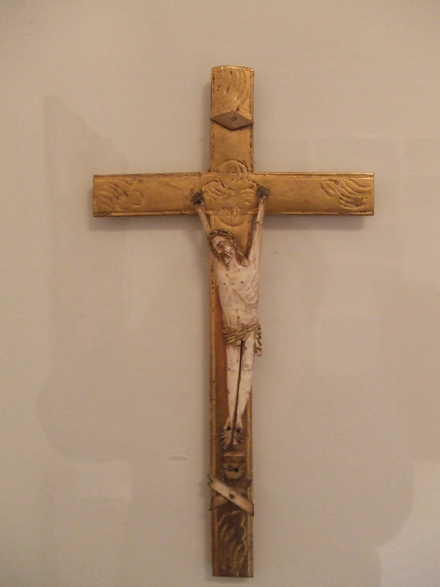 Exemple de Christ Janséniste du XVIIème siècle où l'on note que les bras du corps du Christ sont tendus à la verticale: signe que le Christ n'est pas mort pour tous (5ème proposition)